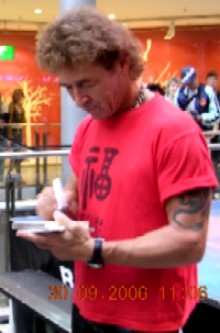 Peter Maffay bei einer Autogrammstunde im September 2006 in Berlin